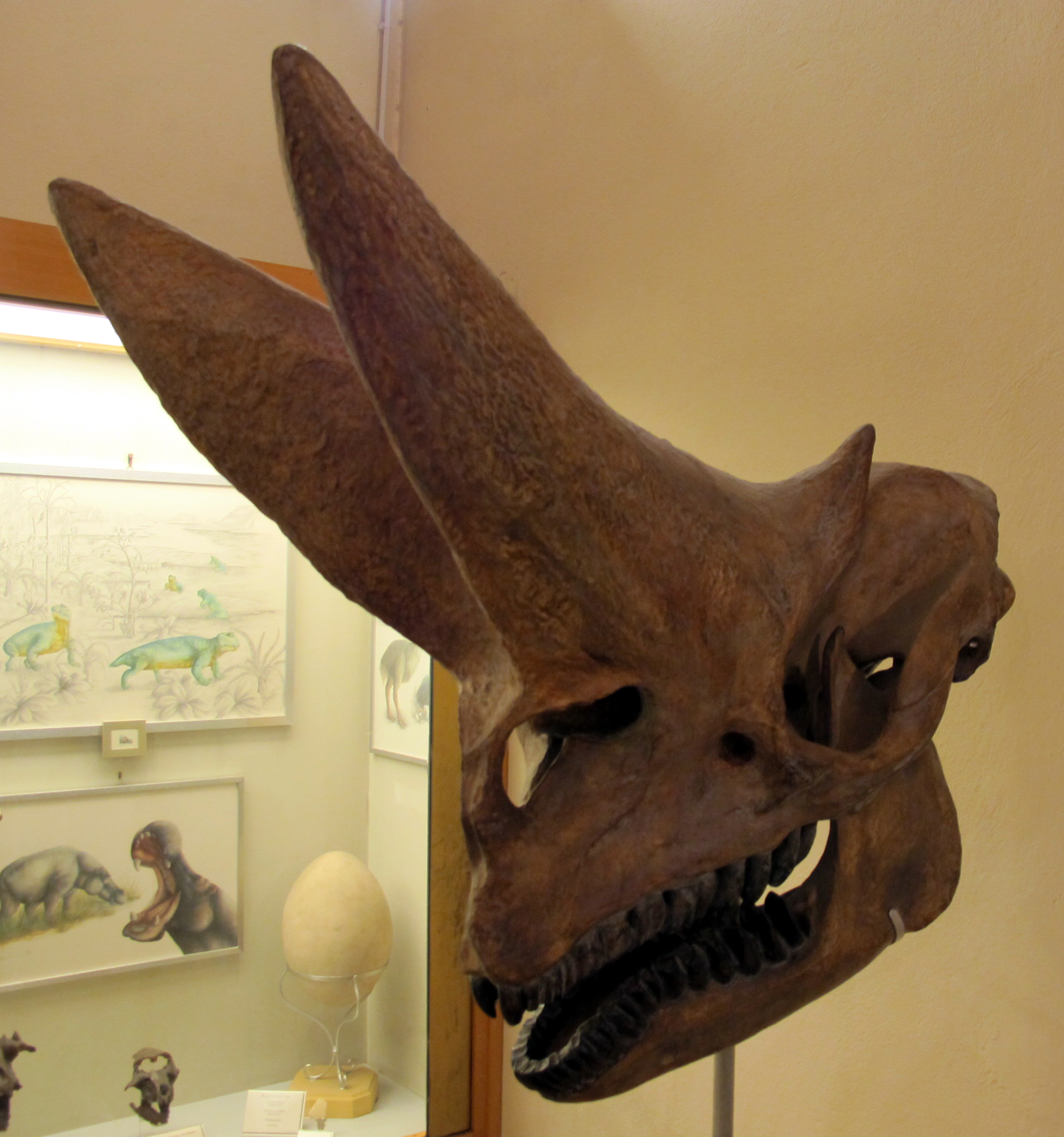 Museo di paleologia, cranio di arsinoitherium zitteli, da fayoum, egitto